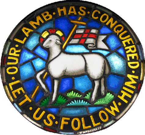 Igreja dos irmãos Morávios